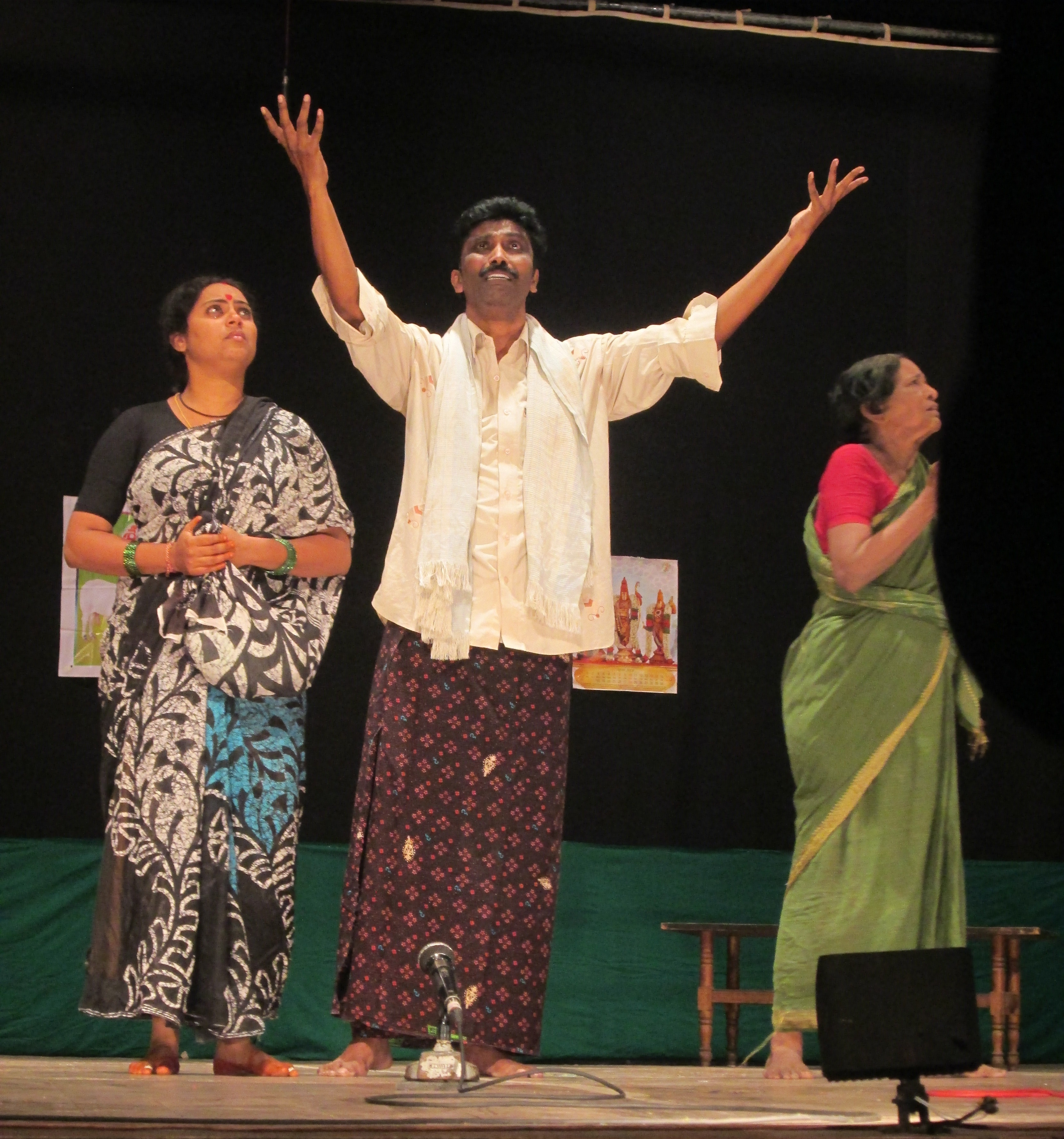 యాది (నాటిక)